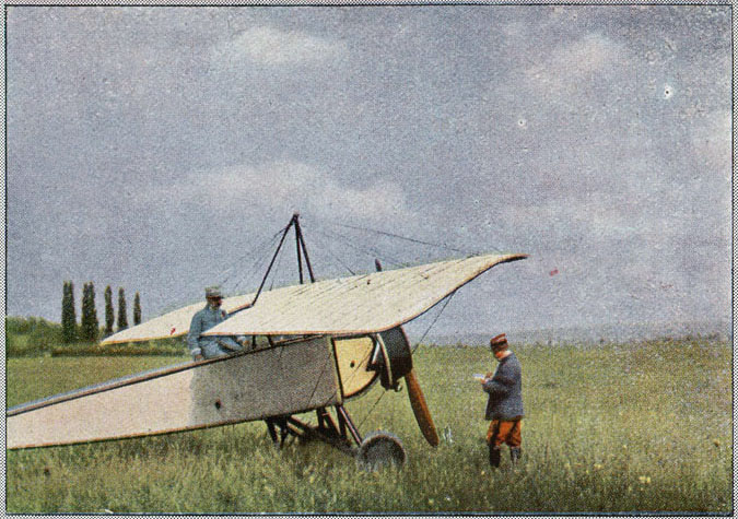 Un_Morane_ bibliothèque de Reims sous la référence : RG_38_n°9_p136.